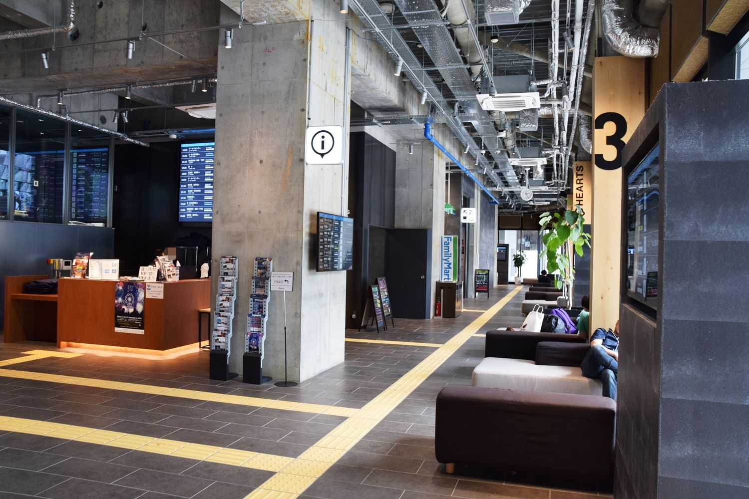 HEARTSバスステーション博多待合室